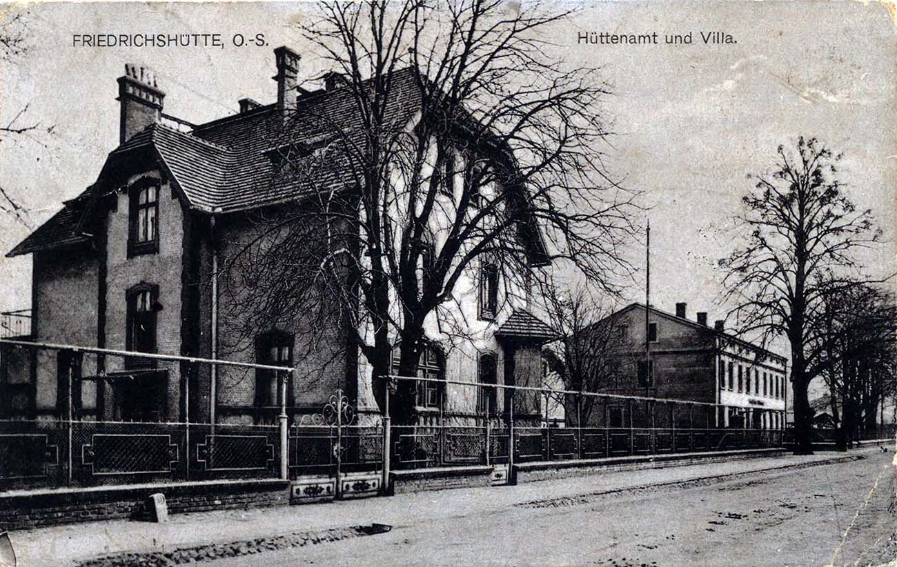 Urząd Hutniczy oraz willa przy obecnej ulicy Zagórskiej w Strzybnicy (Tarnowskie Góry). Pocztówka z l. 1910-1930